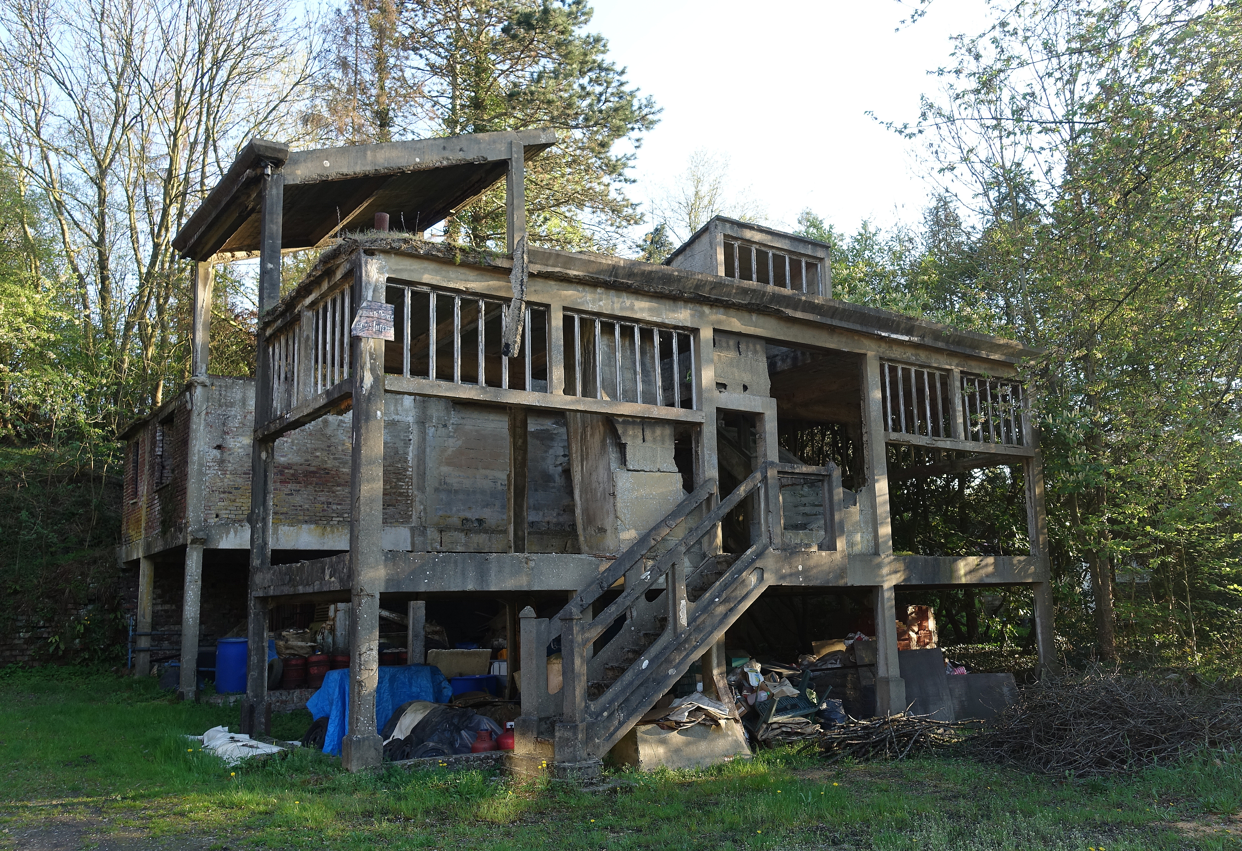 Ophaalgebouw Fosse 1 van Charbonnages d'Arsimont Sambreville